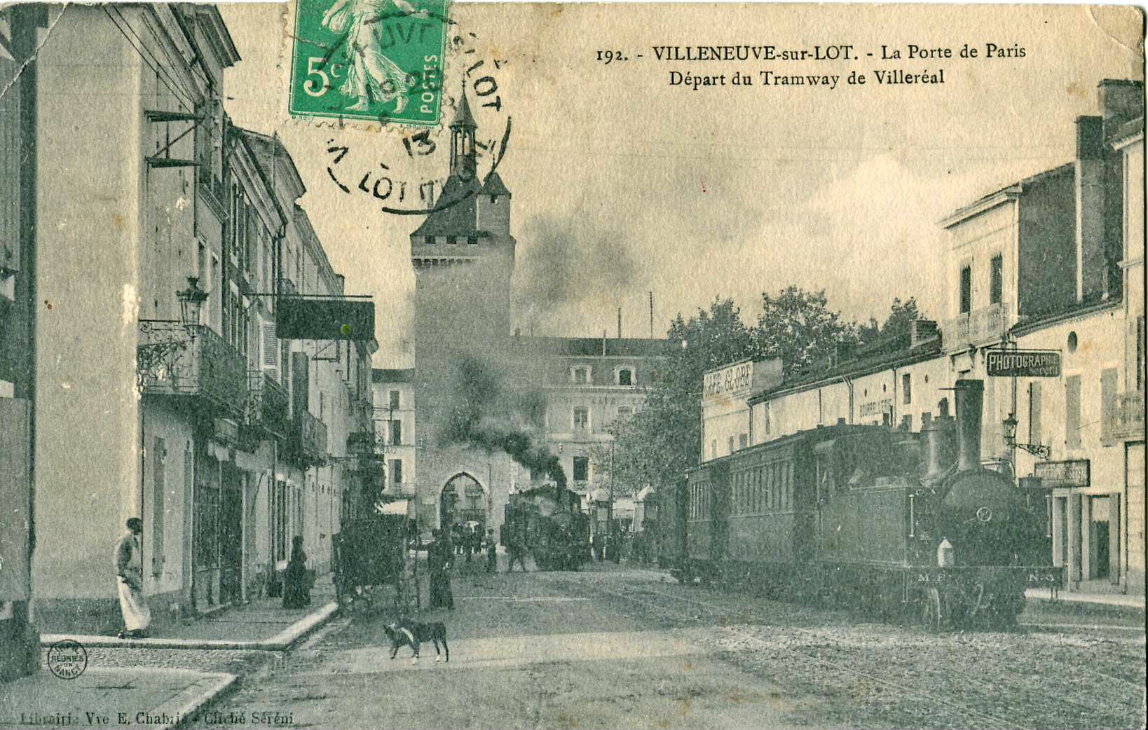 Carte postale ancienne éditée par Librairie Vve Chabri, cliché Séréni, n°192 : VILLENEUVE-SUR-LOT - La Porte de Paris - Départ du Tramway de Villeréal